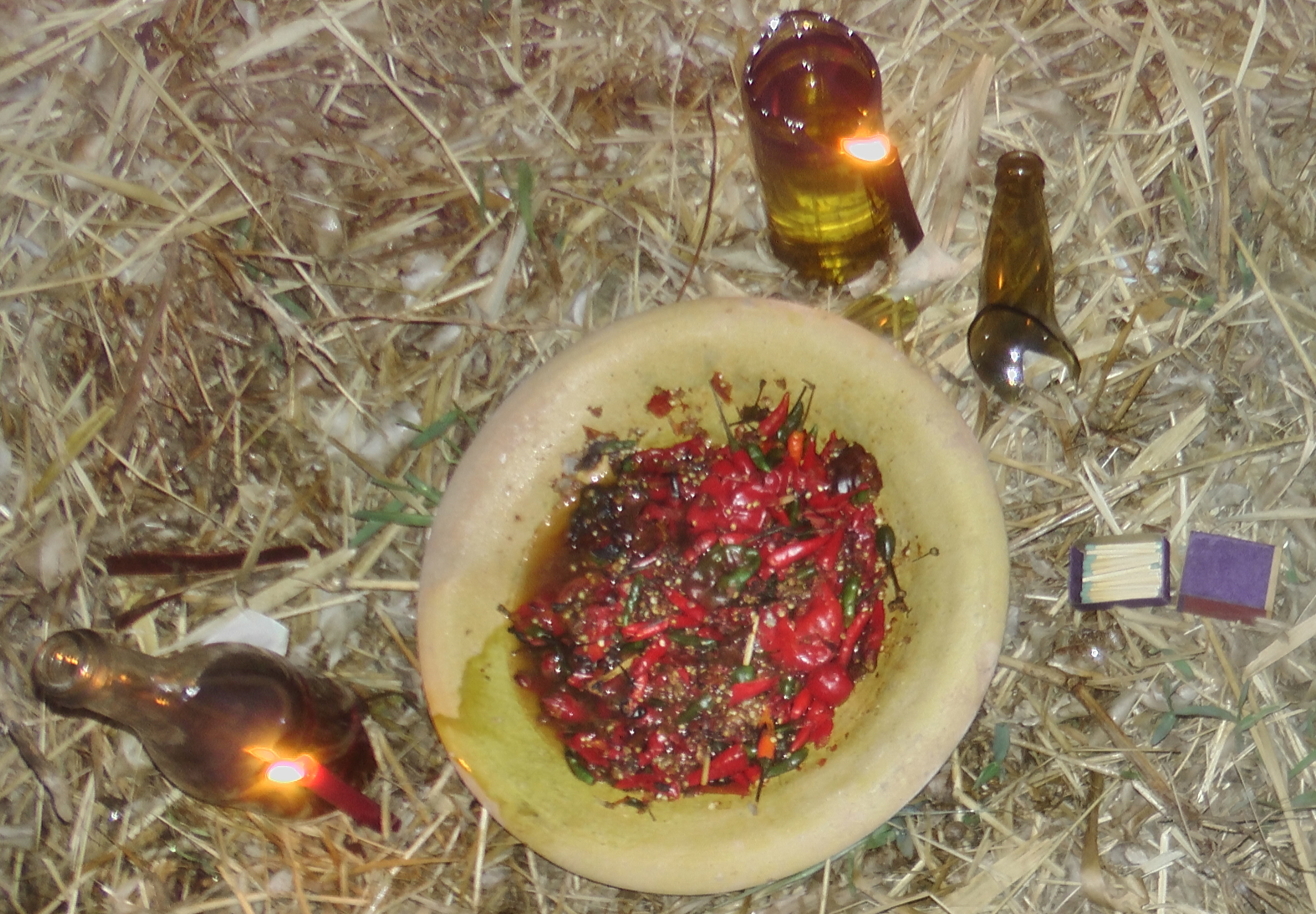 Oferenda para exú desconhecido